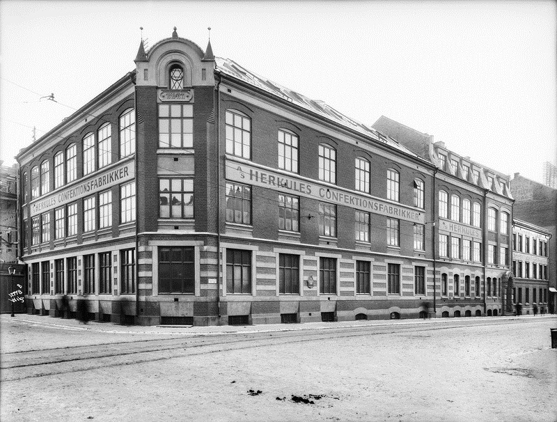 Herkules konfeksjonsfabrikk.